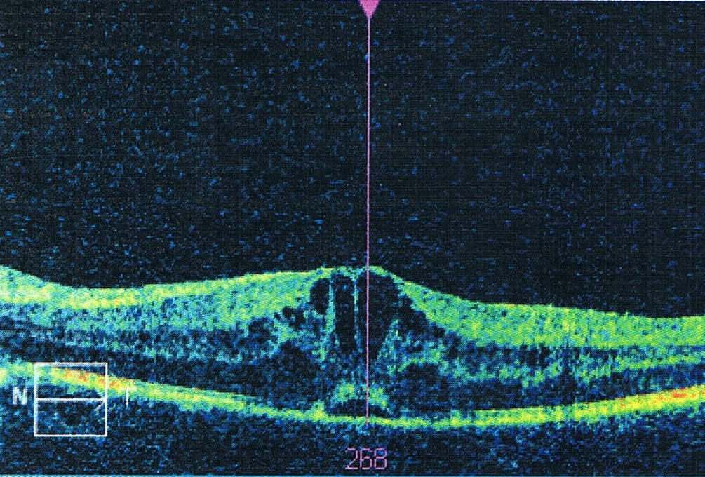 Przekrój przez centralną część siatkówki oka, obraz charakterystyczny dla torbielowatego obrzęku plamki żółtej, wykonany przy pomocy Optycznej Koherentnej Tomografii (OCT). W centrum widać plamkę żółtą, patologicznie zasłoniętą przez torbiele.